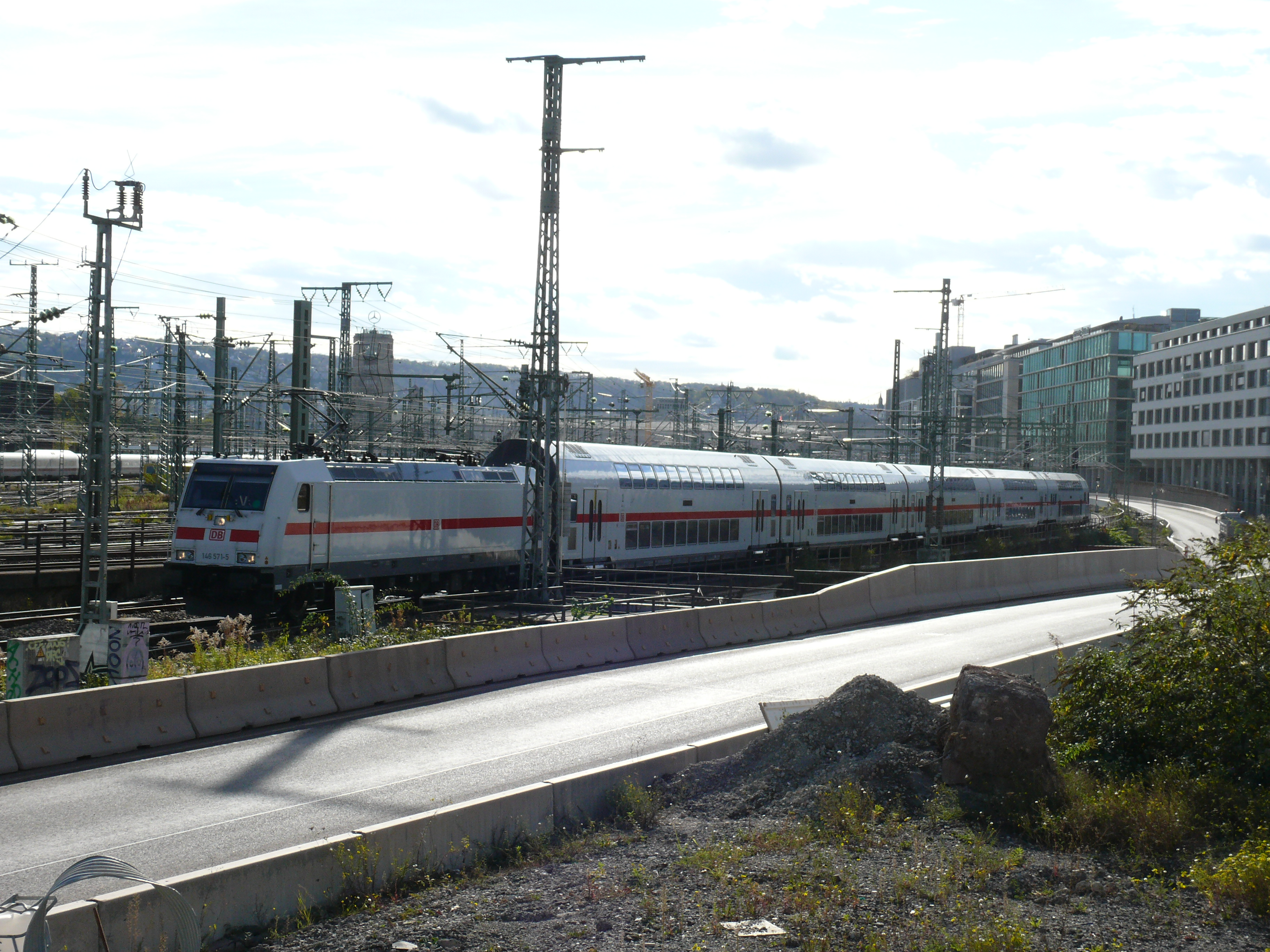 Intercity 2, gezogen von einer Lokomotive der Baureihe 146, bei der Ausfahrt aus dem Stuttgarter Hauptbahnhof.